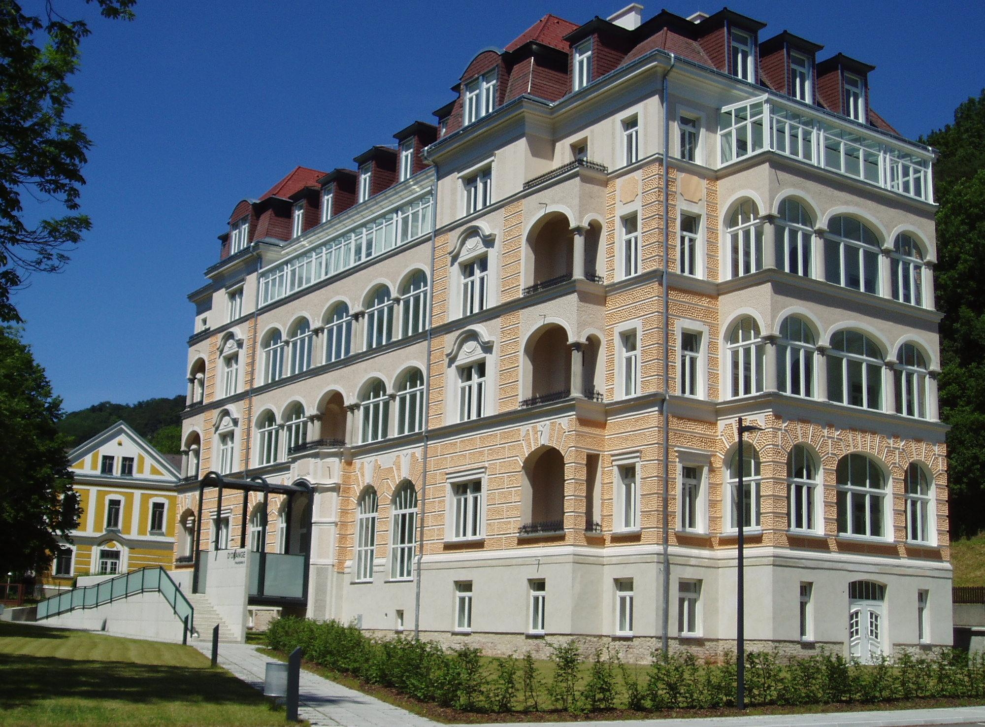 Foto des Curhotel d´Orange in Neuhaus